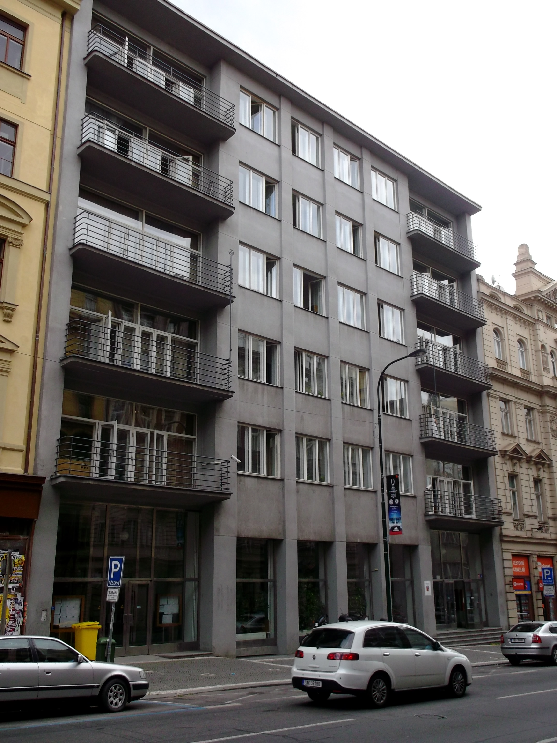 Palác YMCA, Praha 2-Nové Město, Žitná 563/12